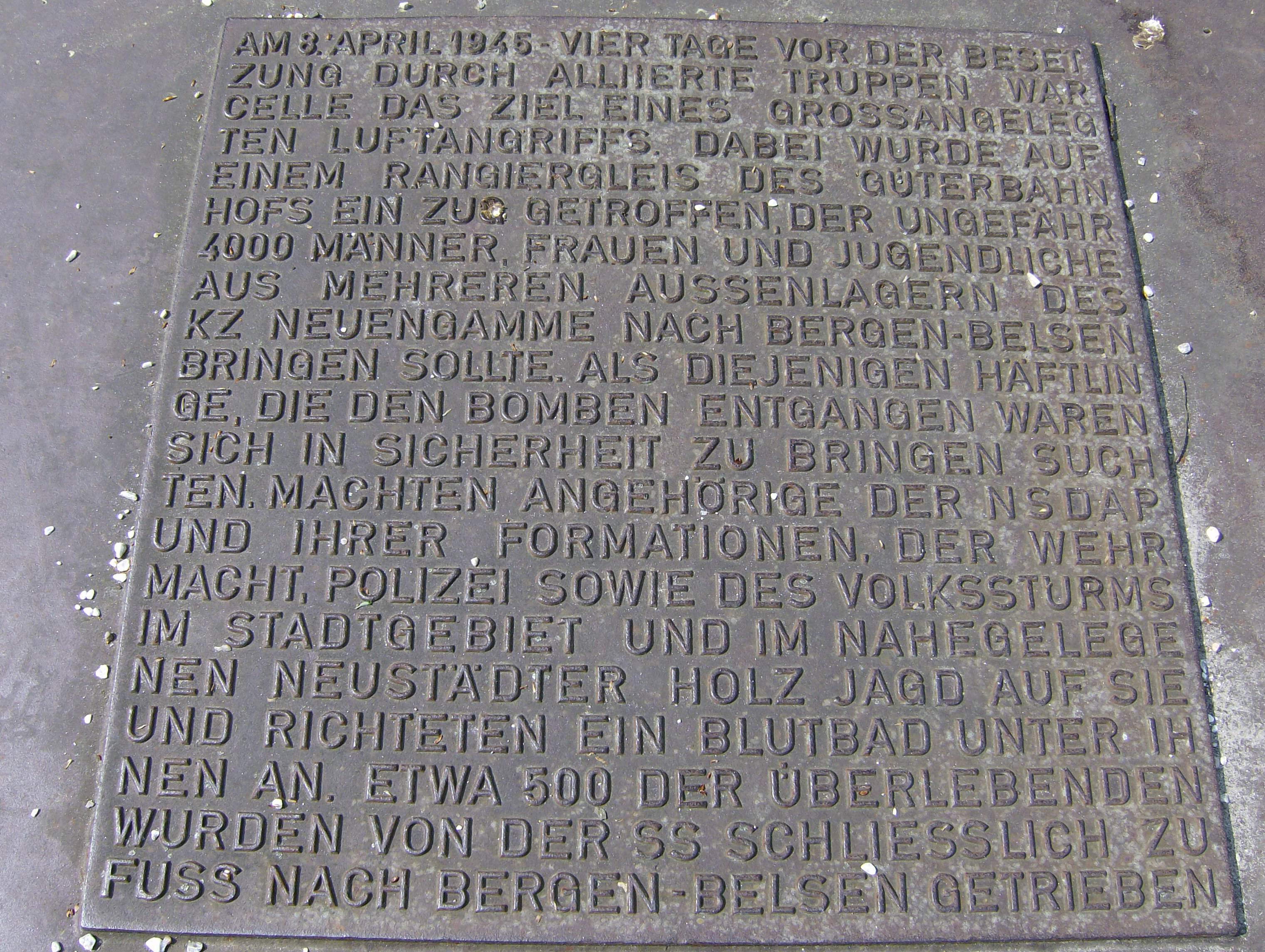 Inschrift des Denkmals zur Erinnerung an die "Celler Hasenjagd" Am 8. April 1945 - vier tage vor der Besetzung durch allierte truppen war Celle das Ziel eines grossangelegten Luftangriffs. Dabei wurde auf einem Rangiergleis des Güterbahnhofs ein Zug getroffen, der ungefähr 4000 Männer, Frauen und Jugendliche aus Mehreren Aussenlagern des KZ Neuengamme nach Bergen-Belsen bringen sollte. Als diejenigen Häftlinge, die den Bomben entgangen waren sich in Sicherheit zu bringen suchten, machten Angehörige der NSDAP und ihrer Formationen, der Wehrmacht ...